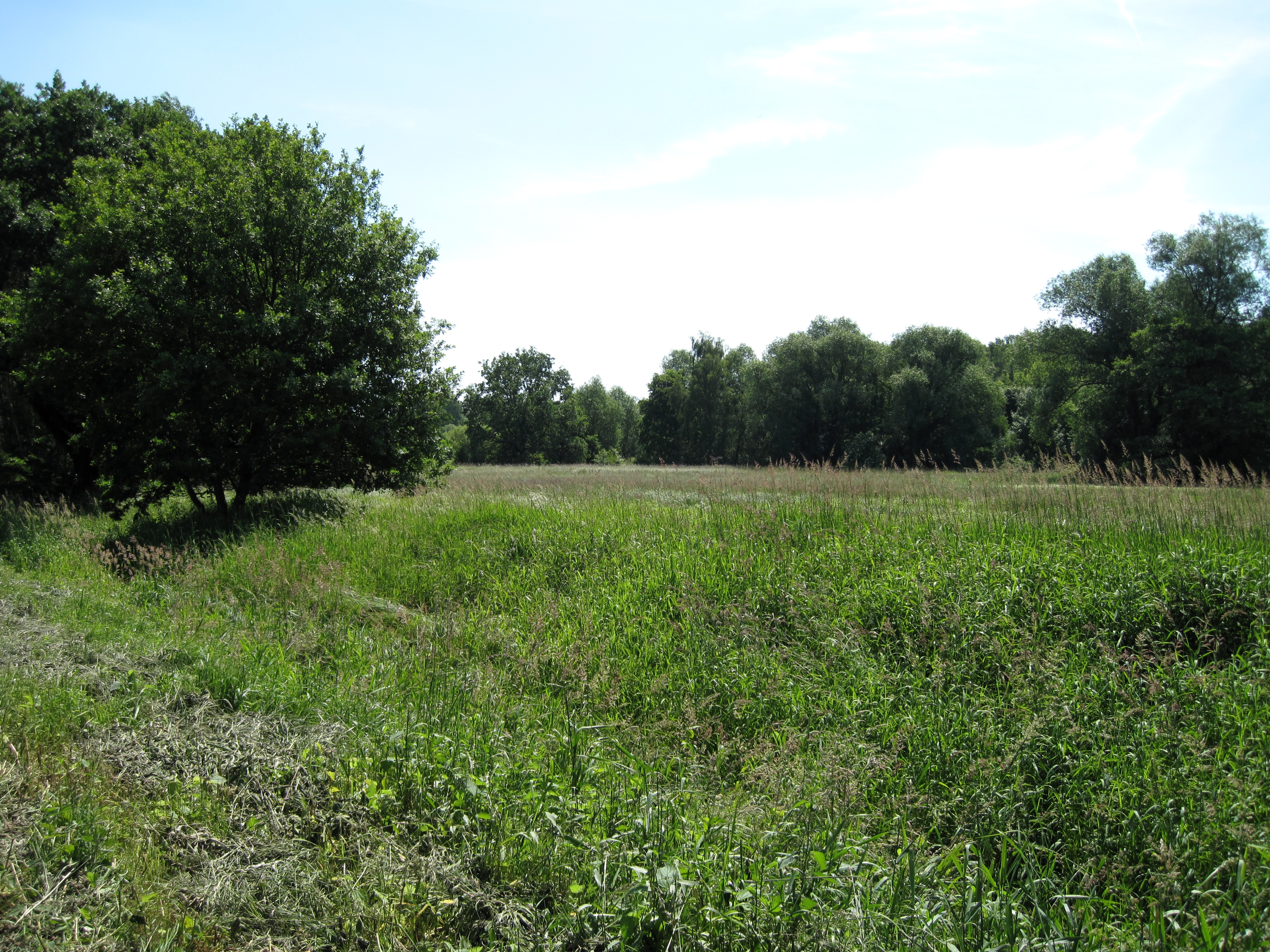 Pankegraben vor dem Naturschutzgebiet „Faule Wiese“ in Zepernick